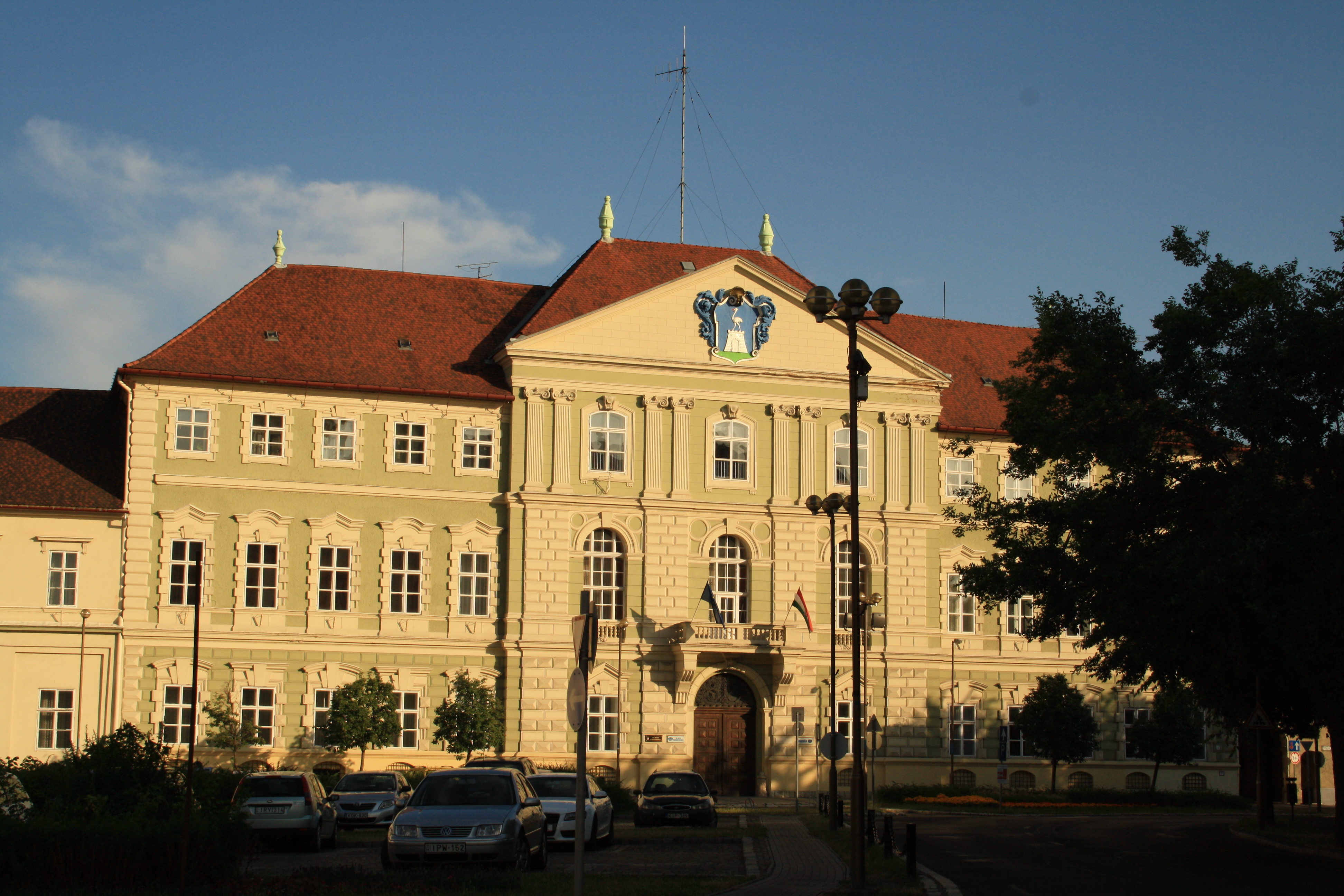 Megyi tanácsház (Szombathely, Berzsenyi Dániel tér 1.)